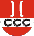 Wappen der tschechischen Gemeinde Žabčice (dt. Schabschitz)